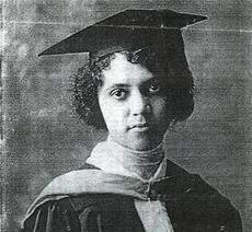 Ball, Alice Augusta (1892-1916) 1915